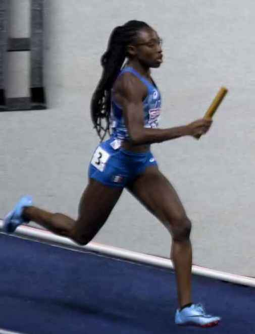 EKB42724 4x400m dames claes